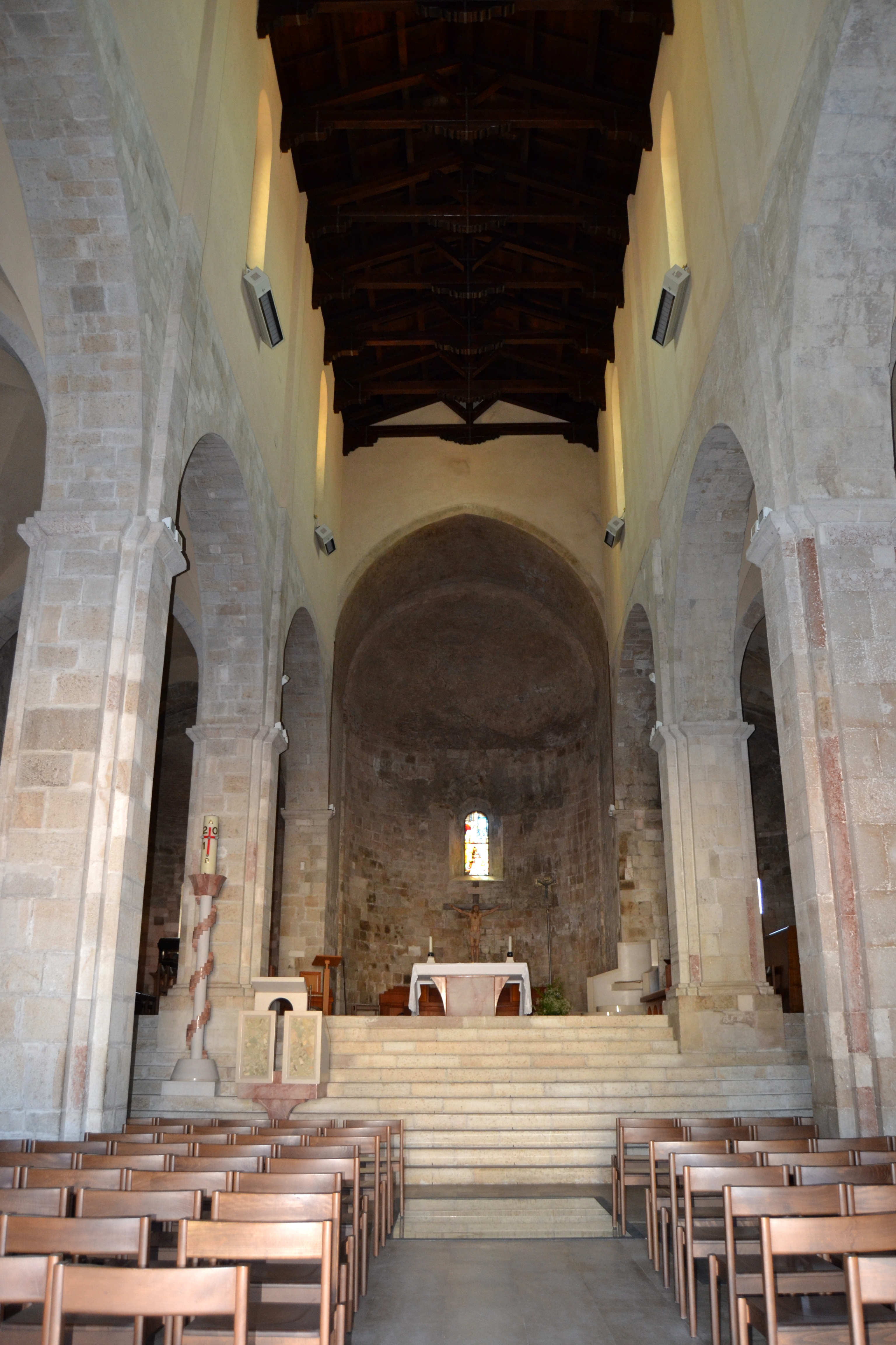 Duomo di Termoli, interno